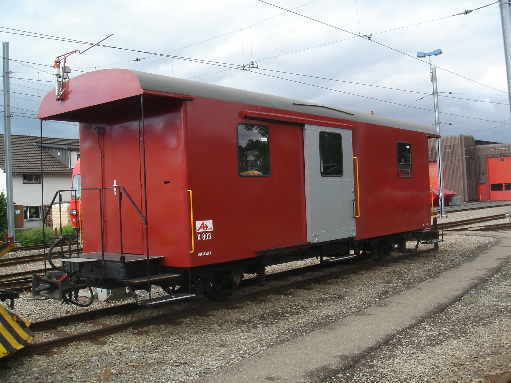 Hilfswagen X 803 der Appenzeller Bahnen vor der Werkstätte Gais